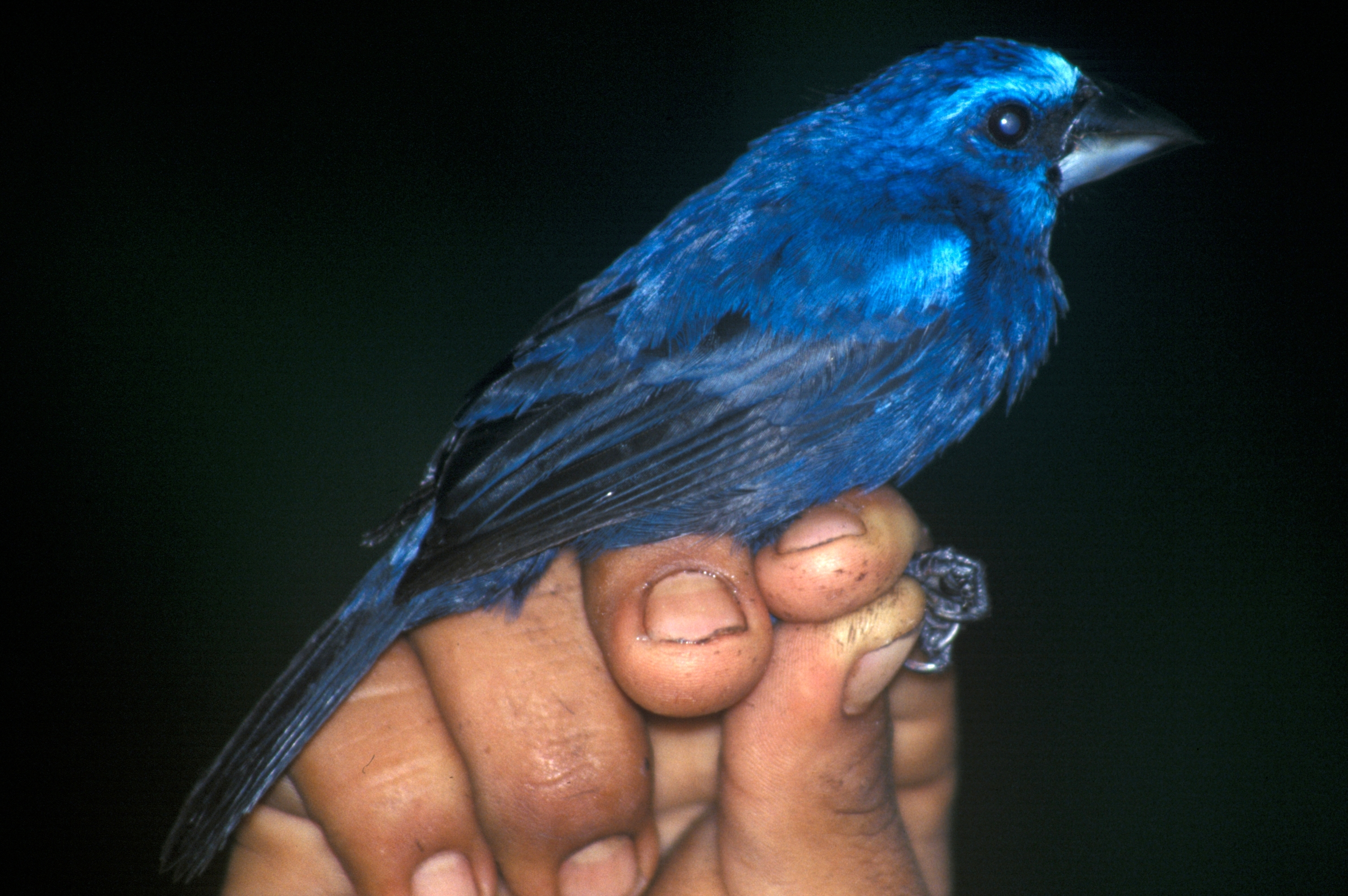 Blue-black Grosbeak (Cyanocompsa cyanoides). Male from Cordillera del Cóndor, Ecuador.